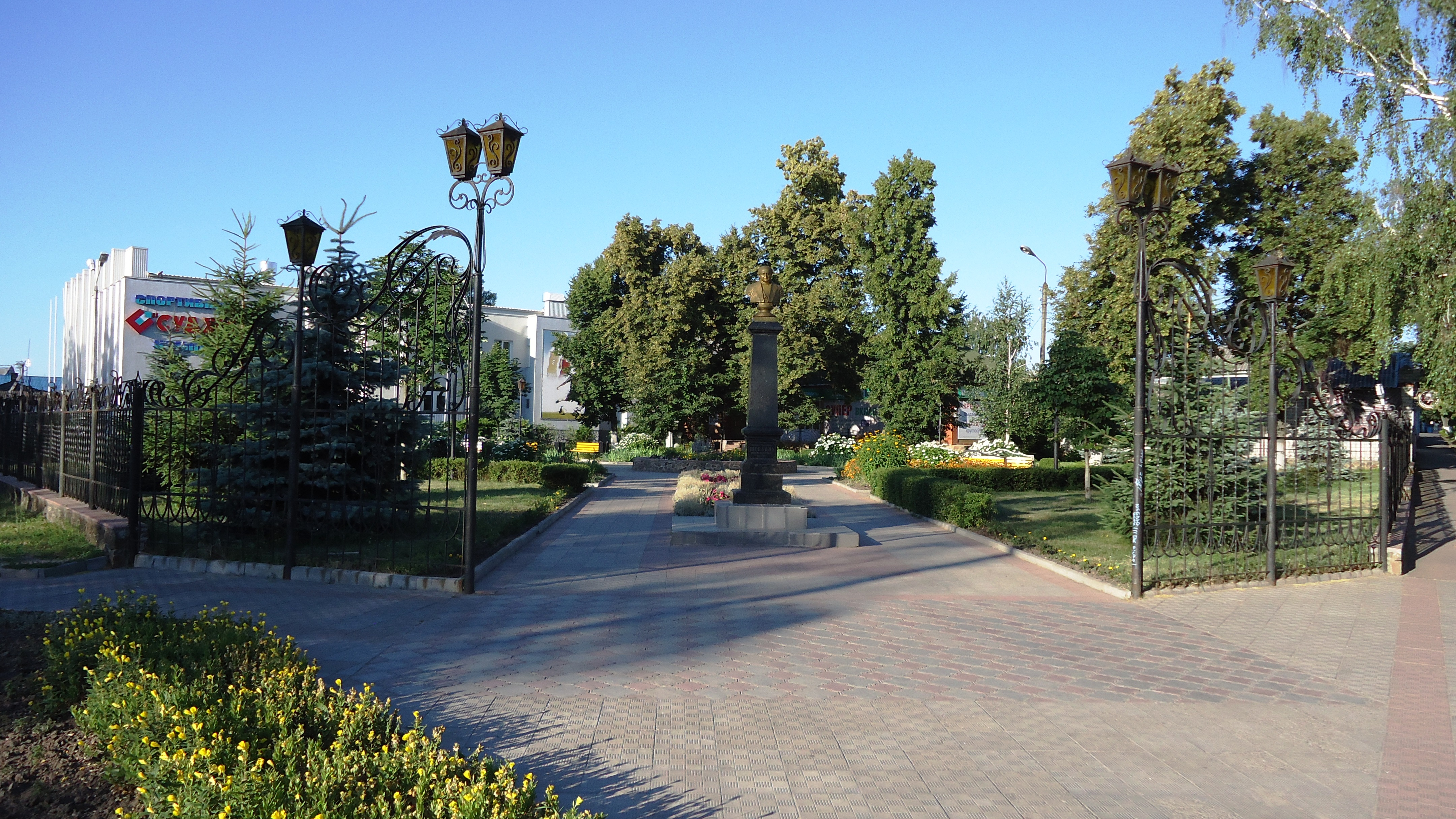 парк им. М.С. Щепкина